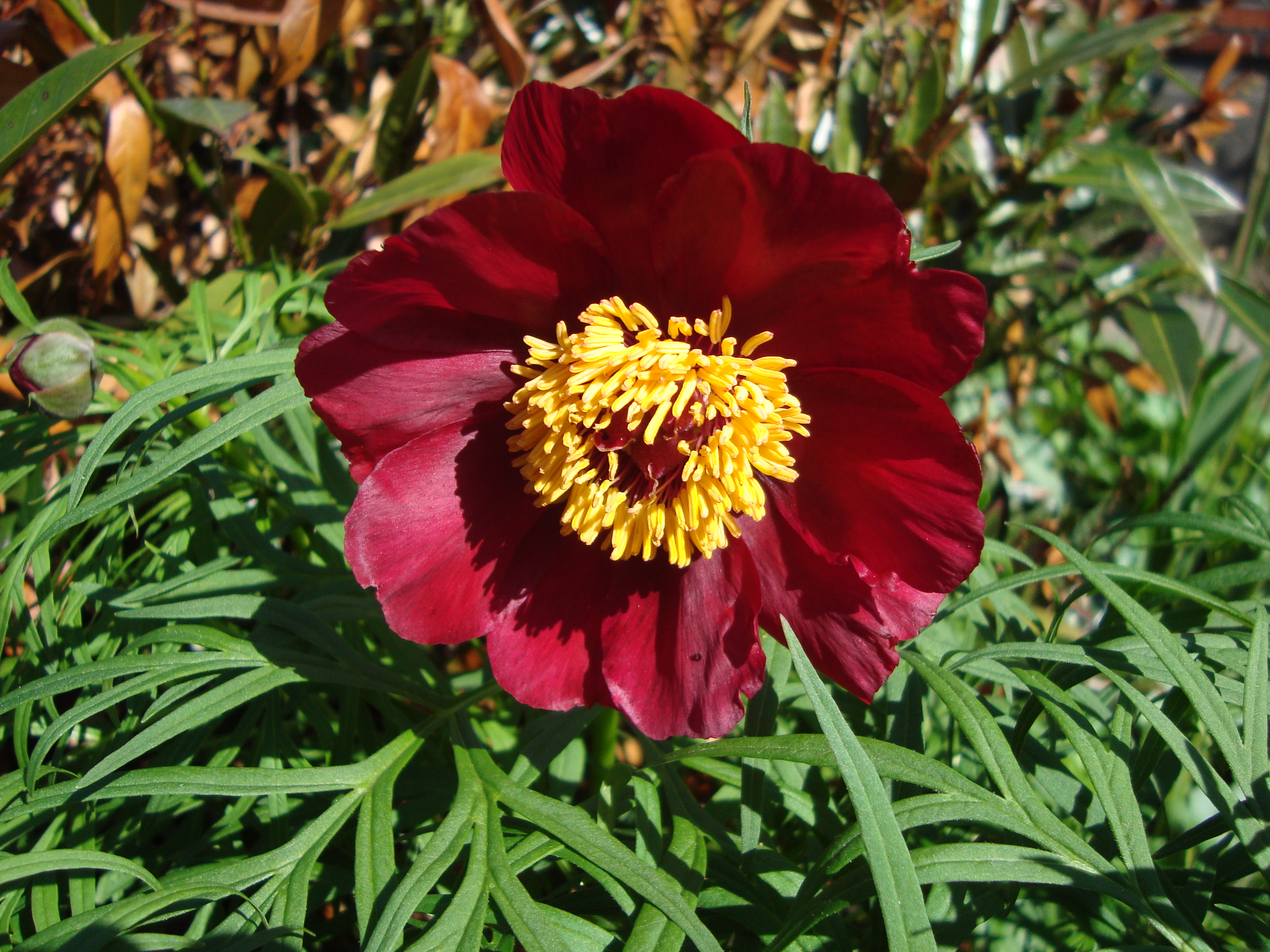 Paeonia × hybrida 'Monica'